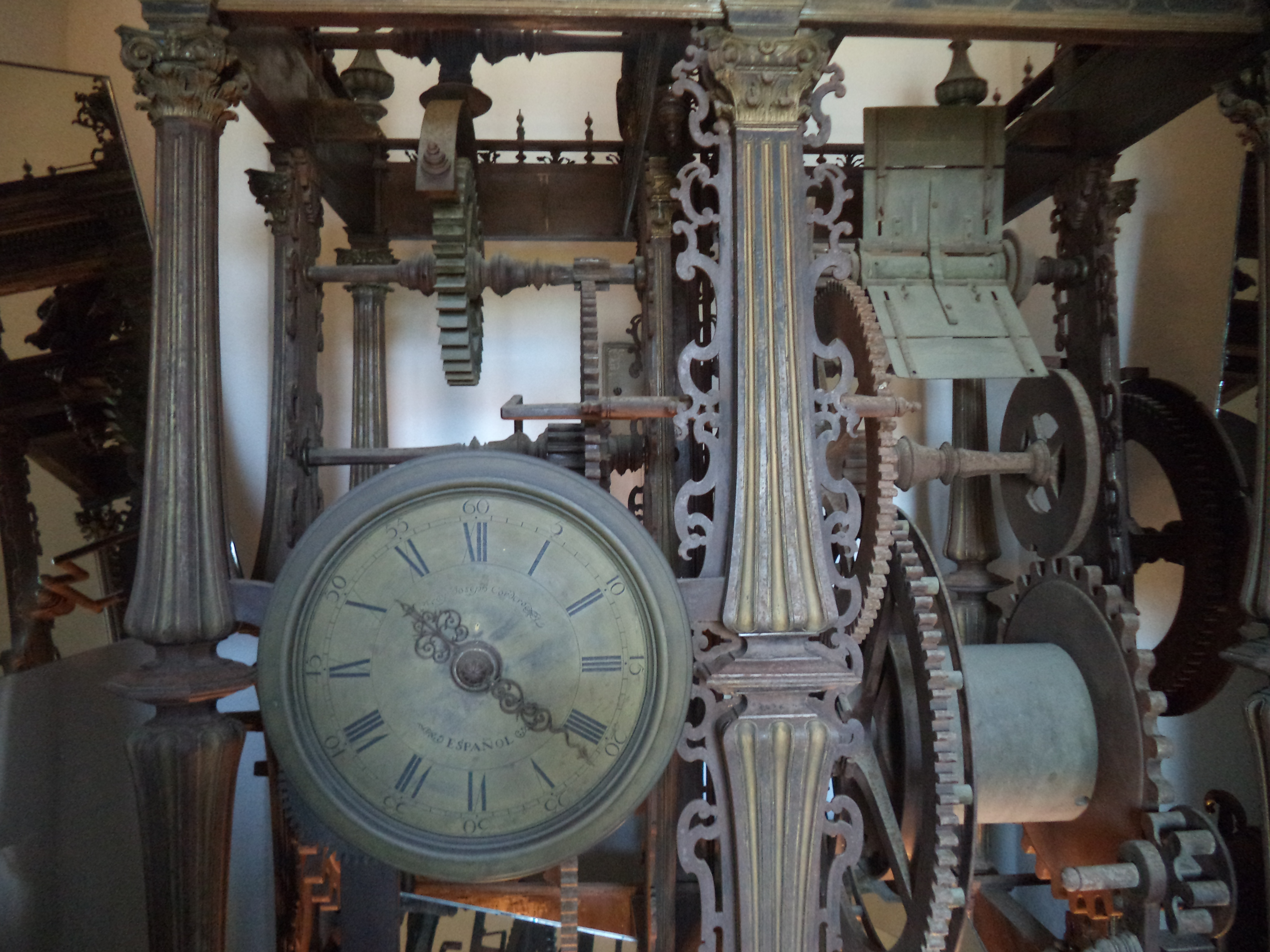 El reloj cuenta con una inscripción: "Este reloj se empezó a fabricar dentro del muro de esta Santa Patriarcal Iglesia de Sevilla por el mes de enero de 1757 y se finalizó el mes de diciembre de 1764 [...] Comenzó y acabó esta obra el hermano Fray José Cordero, religioso lego de la regular observancia de nuestro padre San Francisco, hijo de la provincia de Andalucía y morador de la Casa Grande, de esta ciudad de Sevilla, viado con el auxilio de Nuestra Purísima Señora."